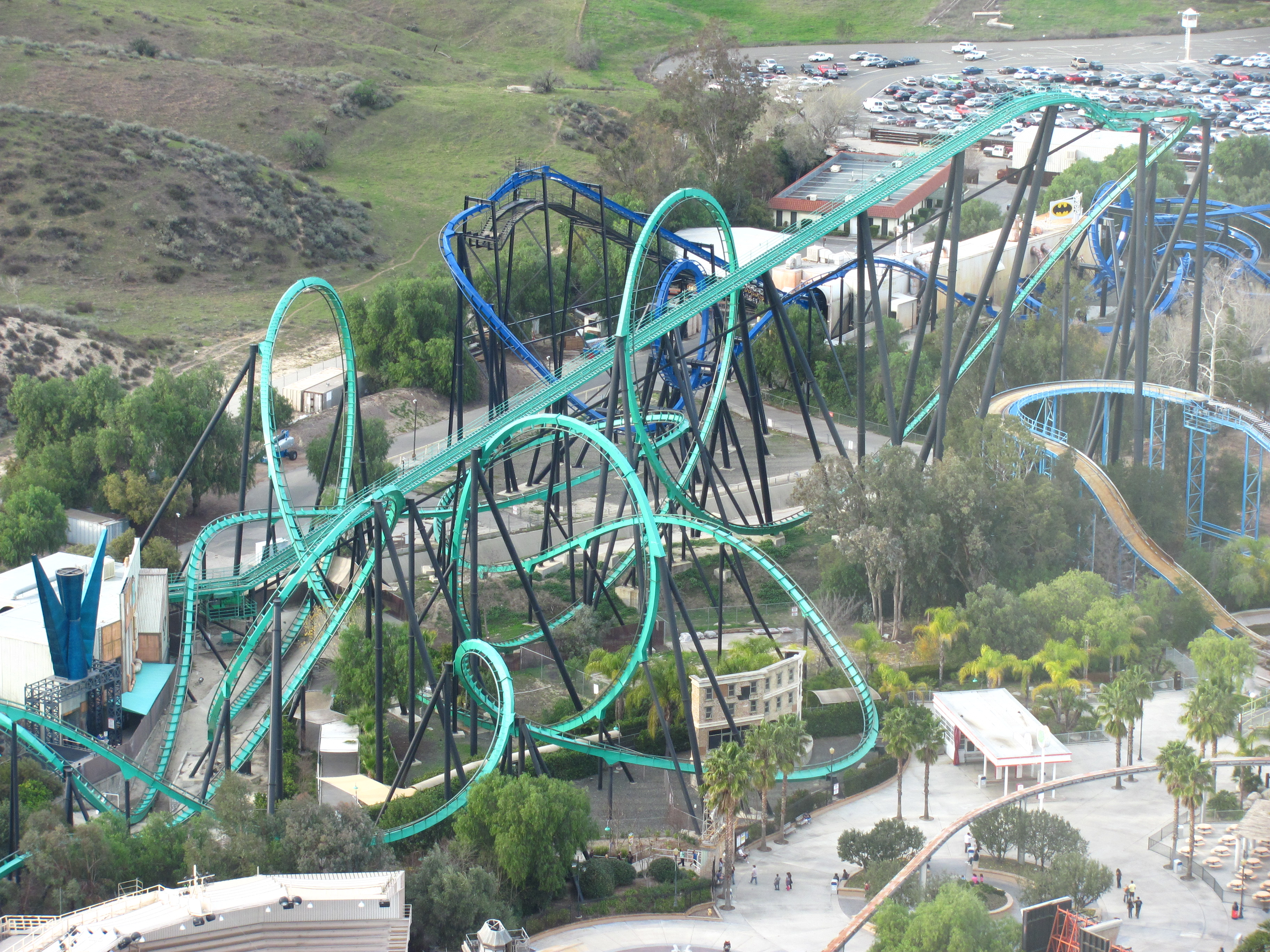 Sky Tower vistas